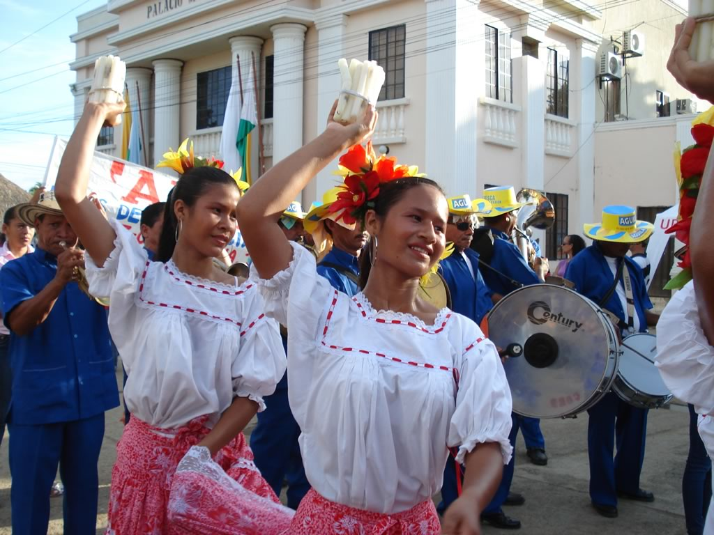 Bailadoras de Cumbia en San Pelayo, Cordoba. Colombia